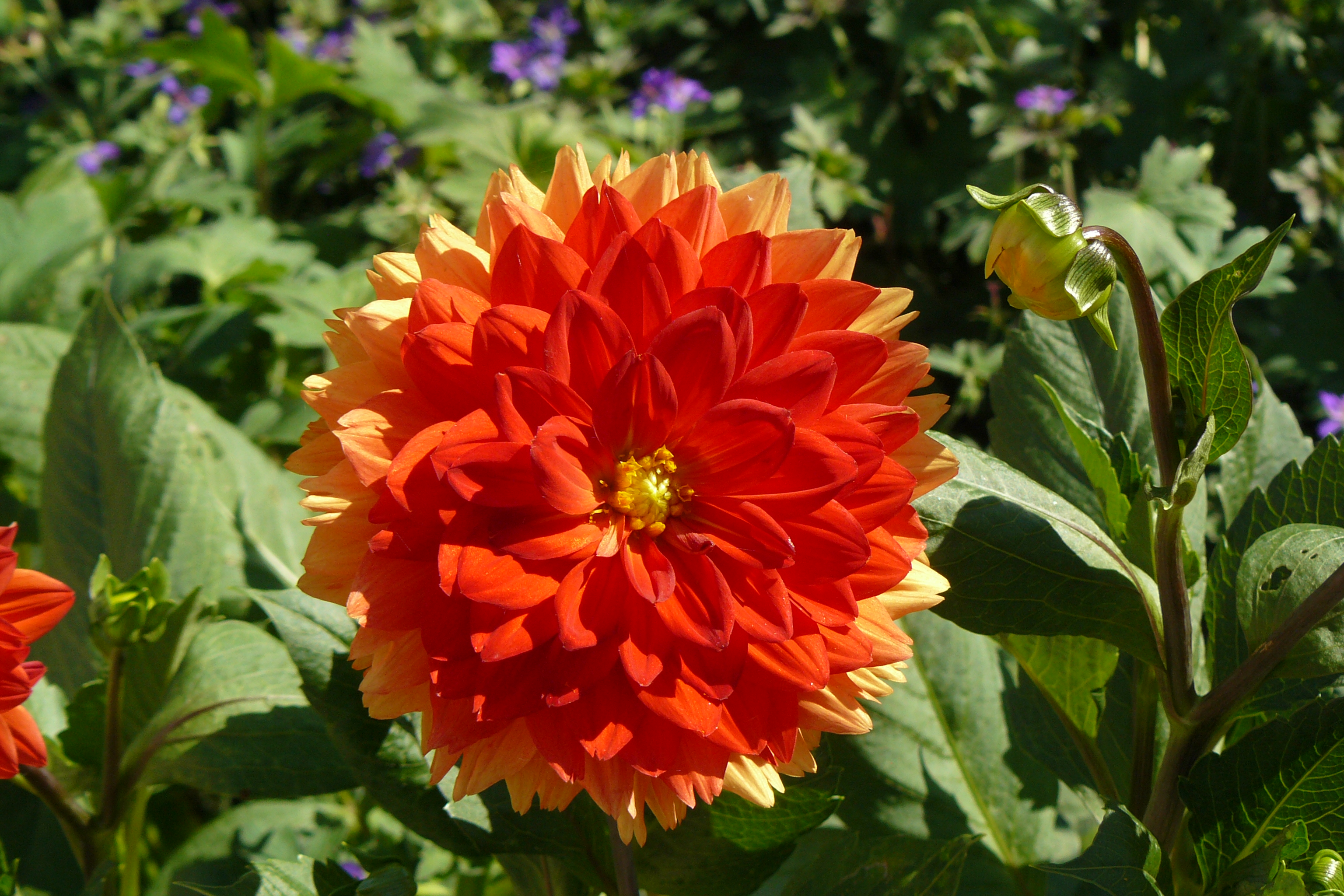 Dahlie "Stadt Spremberg", Züchtung Gartenbaubetrieb Steffen Koschker(Deutschland) im Jahr 2008